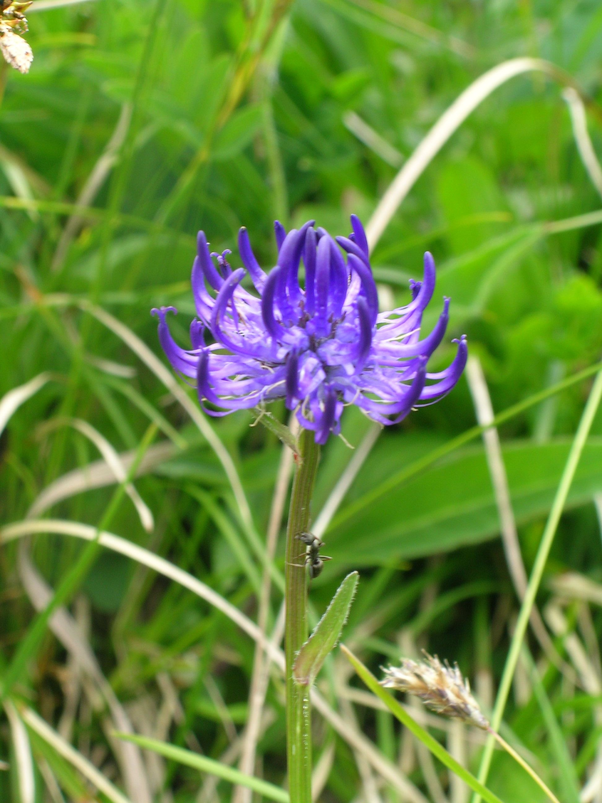 Phyteuma orbiculare, Schynige Platte, Kanton Bern, Schweiz